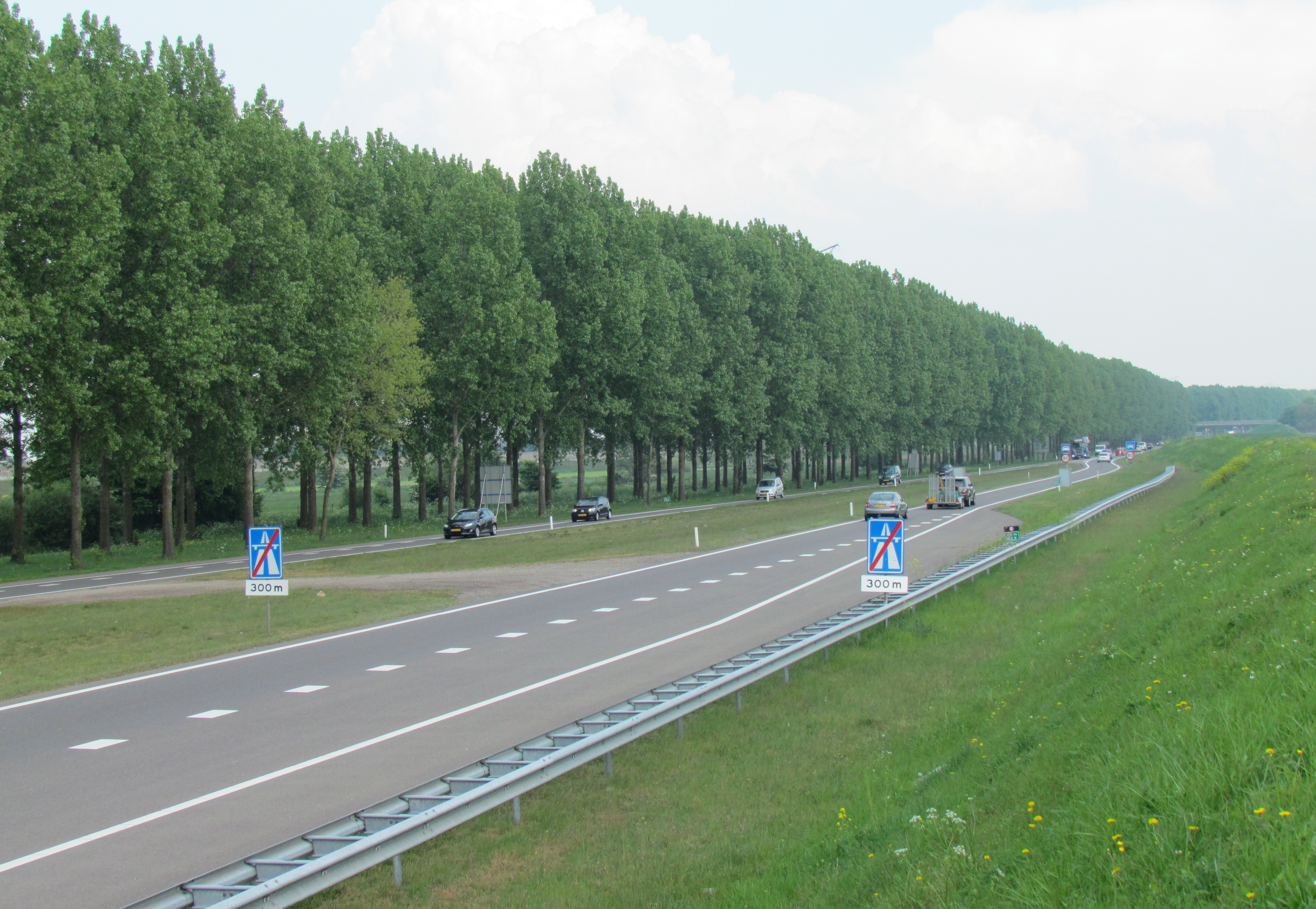 Het oostelijke uiteinde van de Nederlandse snelweg A15 bij Bemmel. Deze snelweg zal (vanaf 2016?) worden doorgetrokken in oostelijke richting, om het een aansluiting op de A12 te geven.